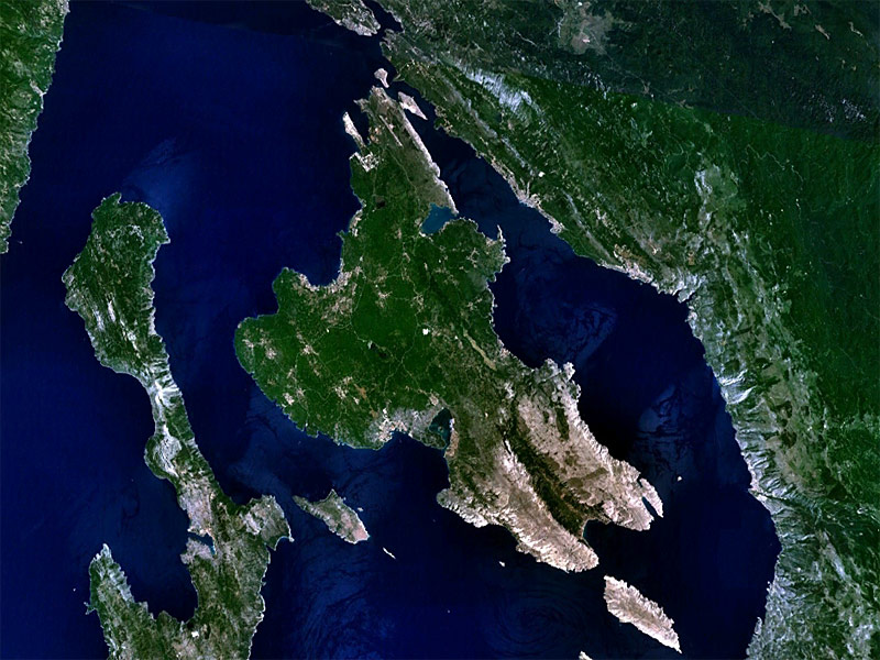 Krk